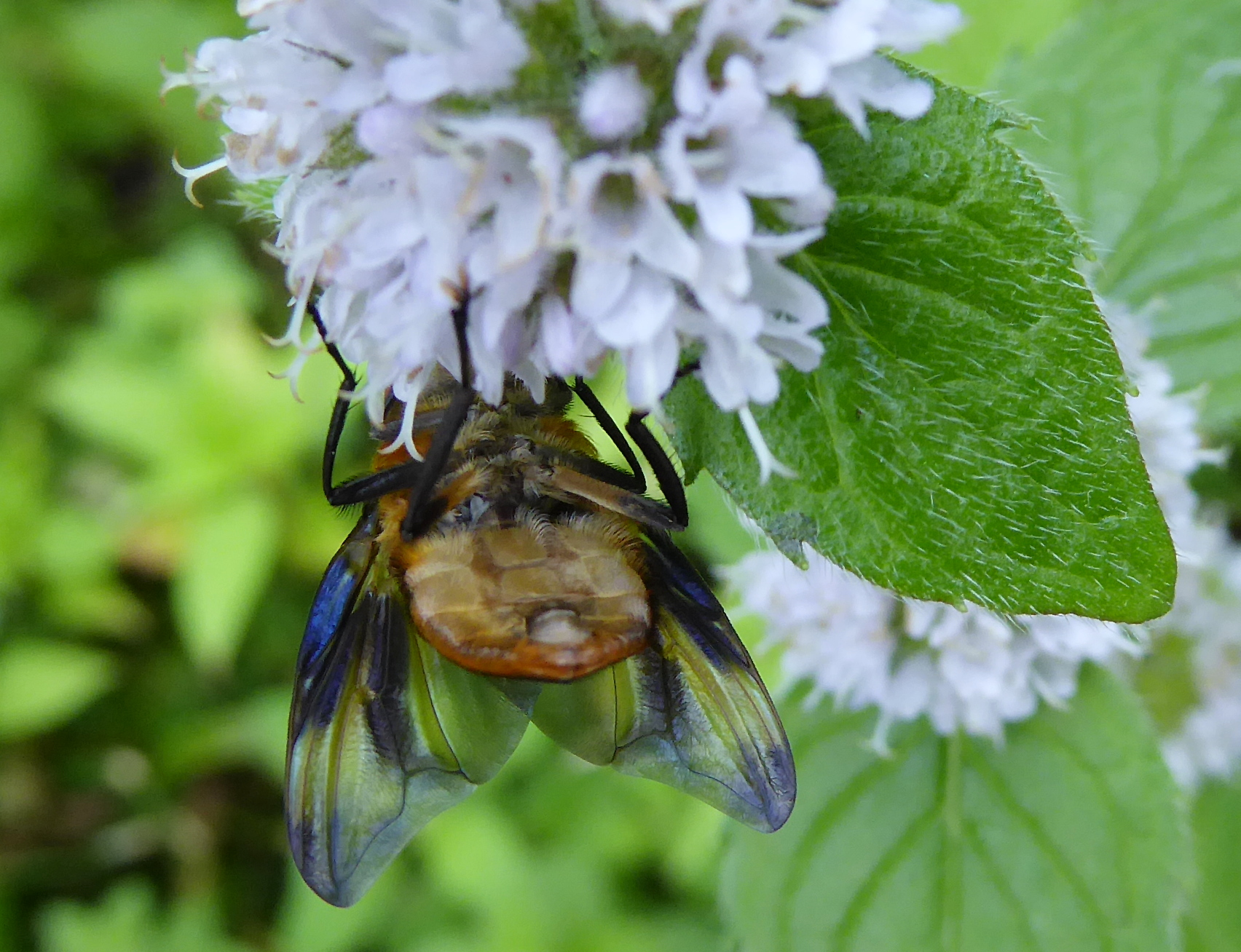 Unterseite der Raupenfliege Phasia hemiptera auf Minze im Gösselgrund (Göttinger Wald) bei Klein Lengden, Landkreis Göttingen, Niedersachsen